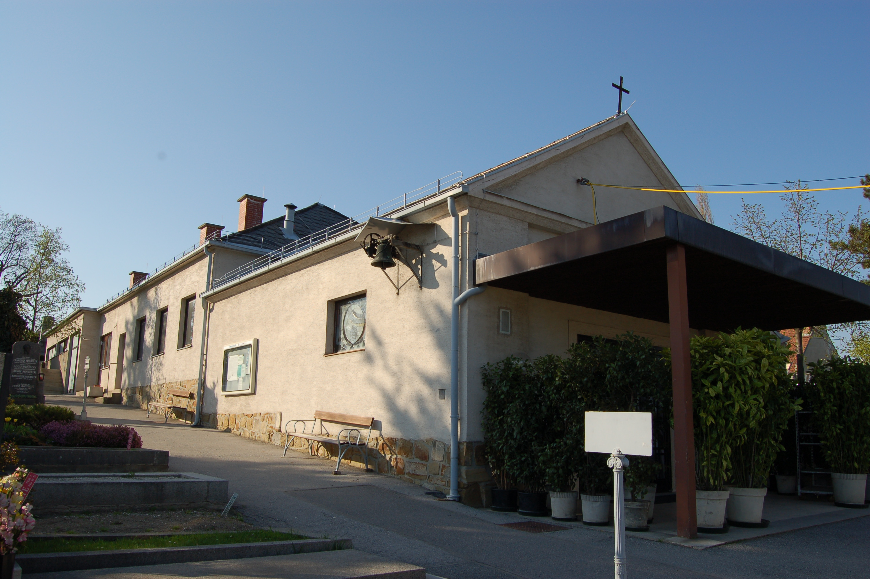 Sieveringer Friedhof, Aufbahrungshalle